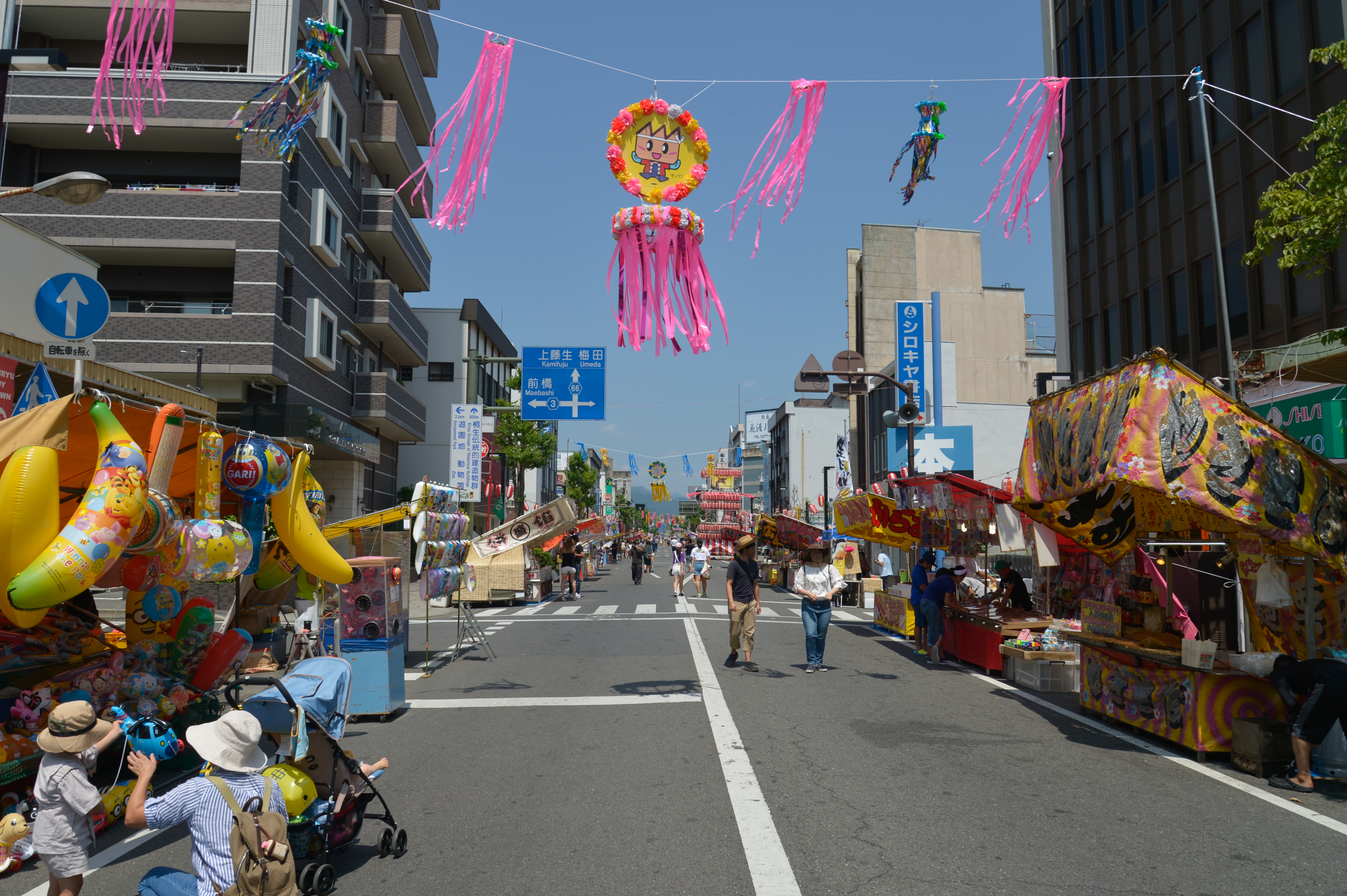 桐生八木節まつりの歩行者天国の様子